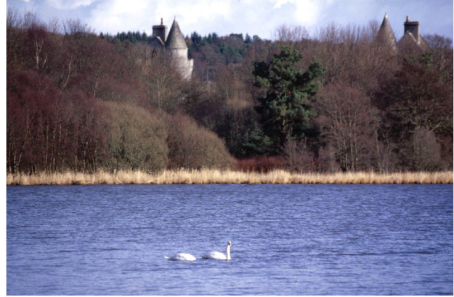 Loch of Skene, Aberdeenshire